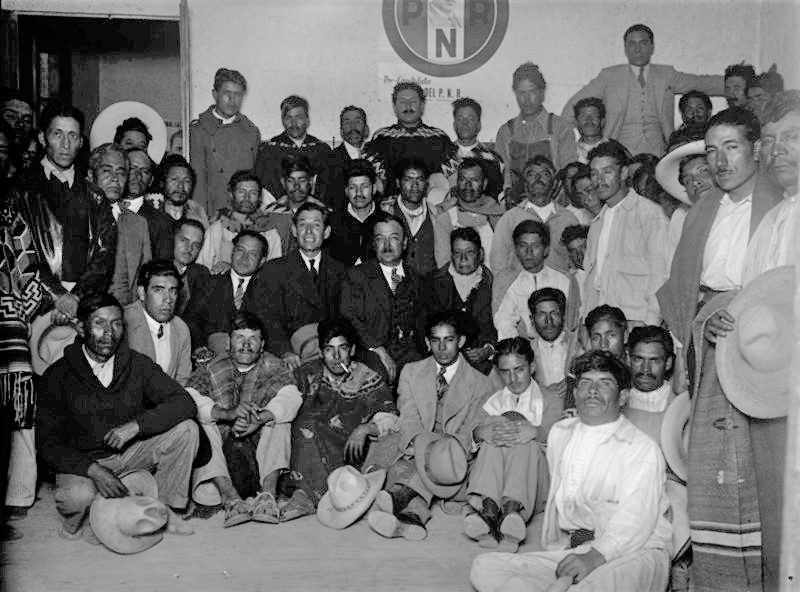 Un candidato del Partido Nacional Revolucionario con trabajadores, entre 1930 y 1935.